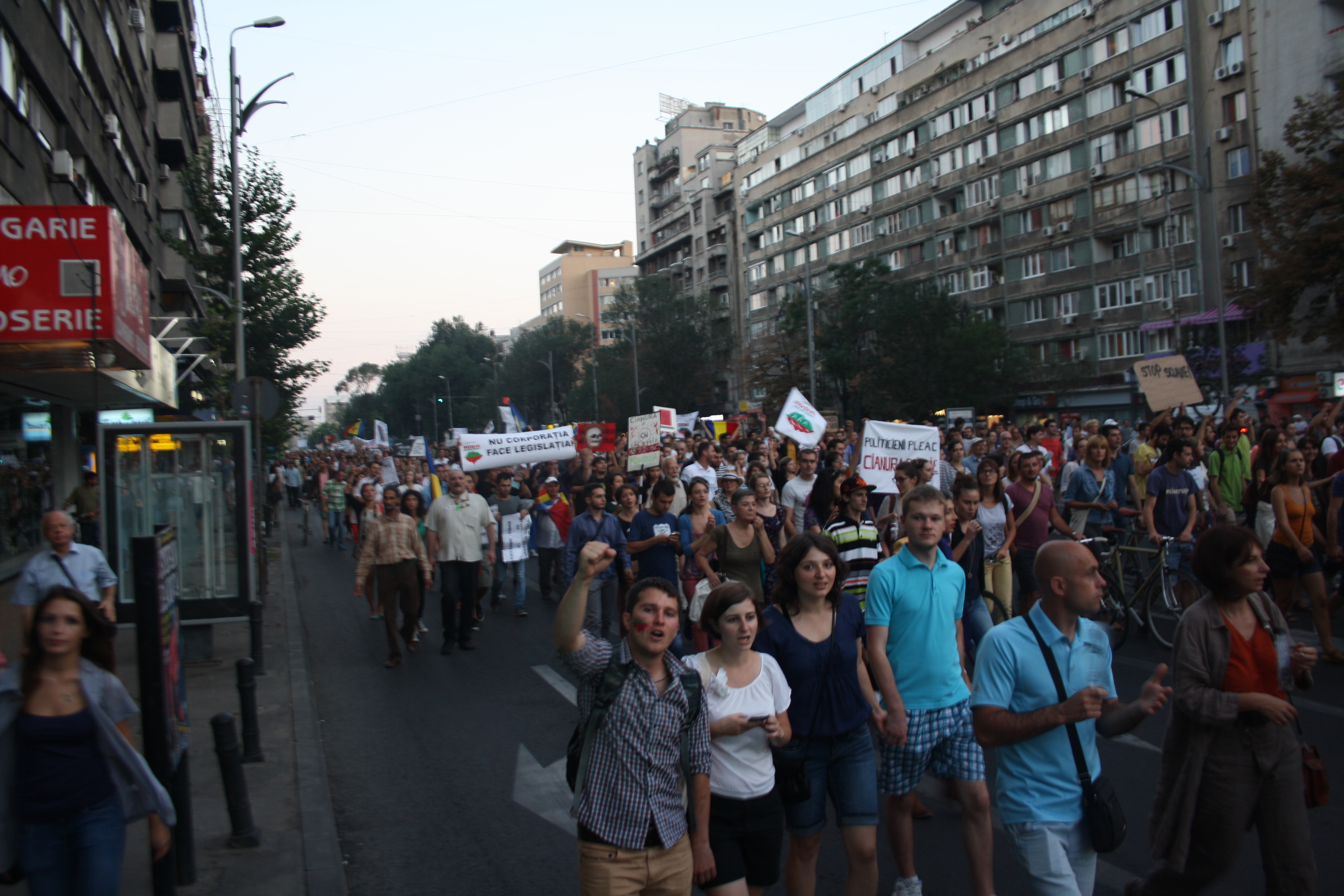 Protest Roșia Montană în București